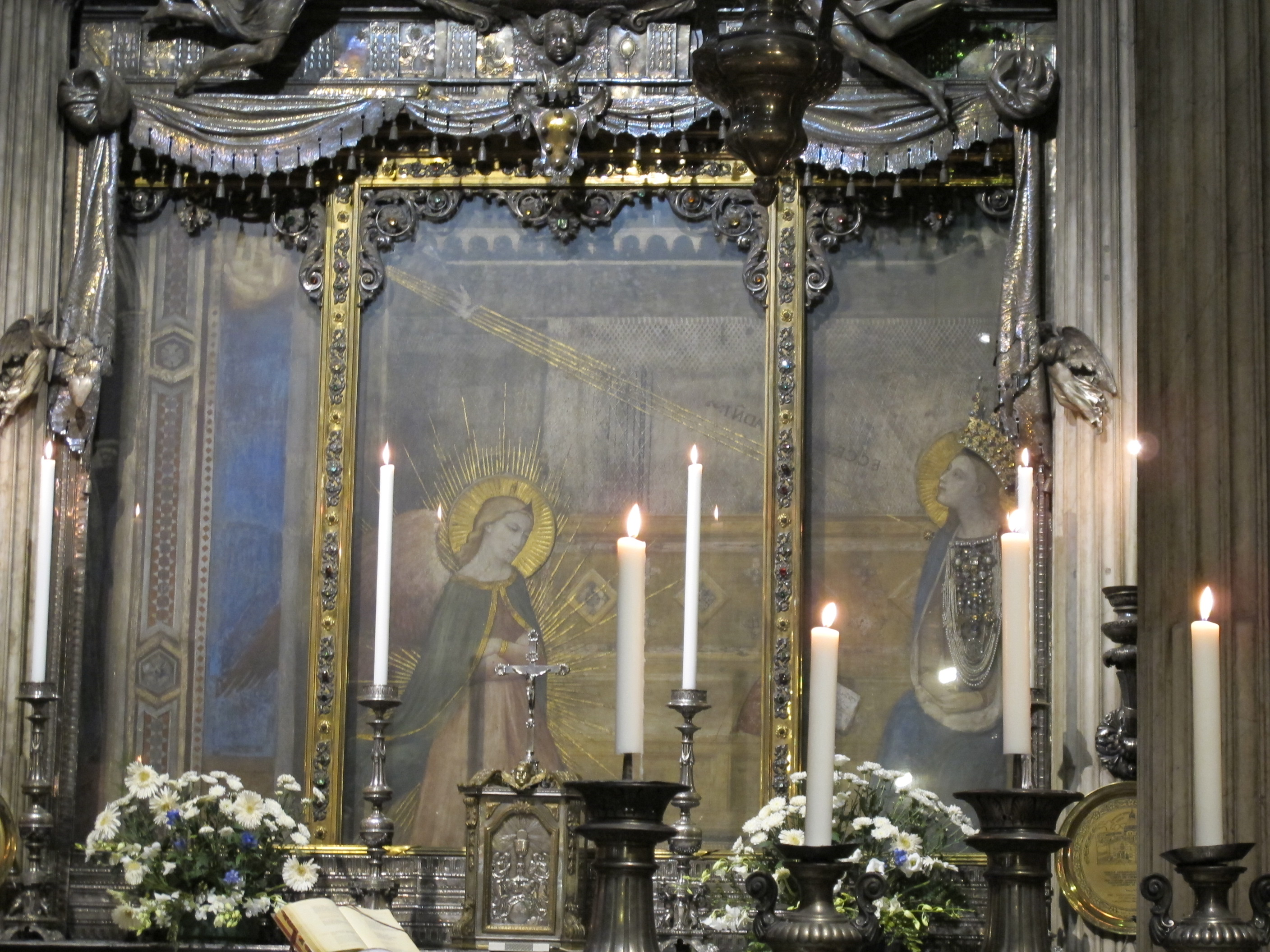 Cappella dell'annunziata, annunciazione